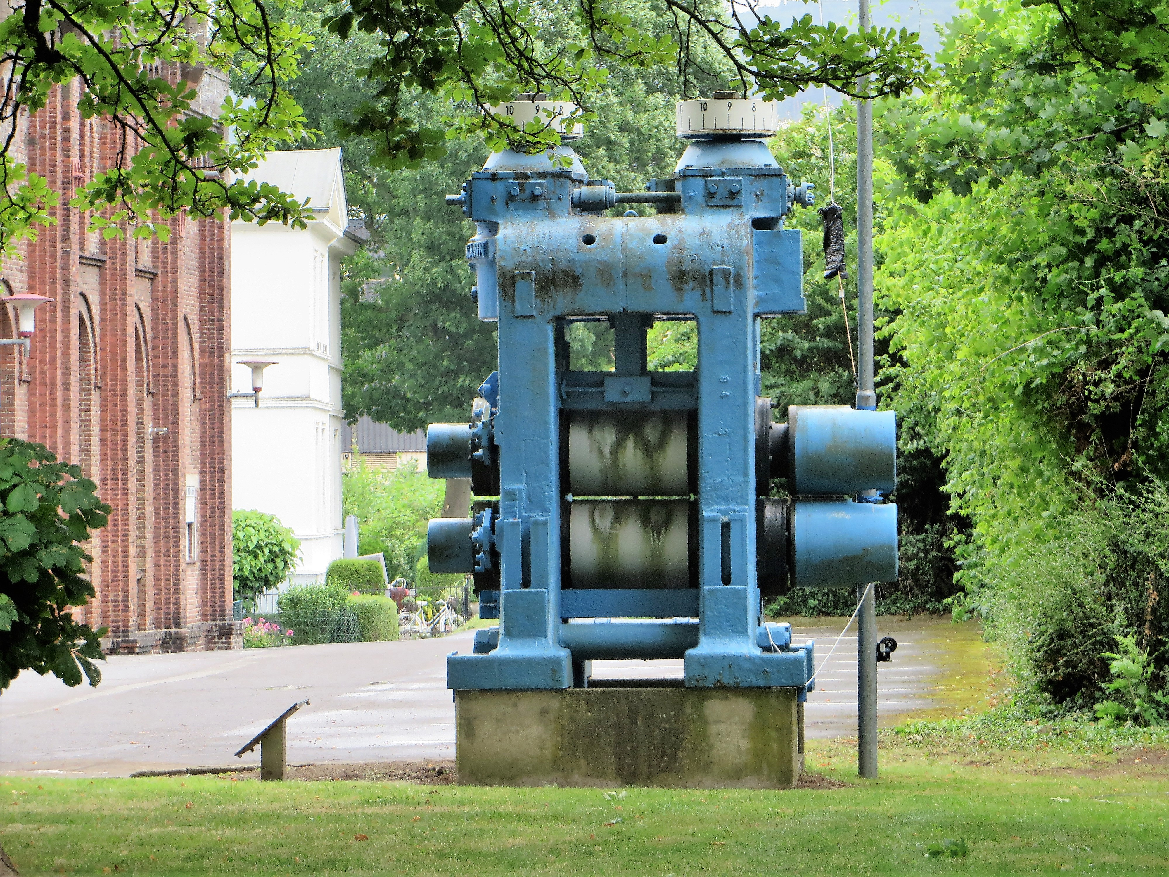 Skulptur vor der historischen Warmwalzhalle im Tudor-Stil von 1899 in Hagen-Hohenlimburg, Bahnstraße 13. Hinweistafel: „Auf diesem Walzgerüst der Mittelbandstrasse wurden vom 3.8.1955 bis zum 20.11.1985 mehr als 15.300.000 t Warmband gewalzt. das Gerüst soll die Erinnerung an die Walzwerker und an die lange Tradition der Bandstahlwalzung in Hohenlimburg wachhalten. – Hoesch Hohenlimburg AG“.